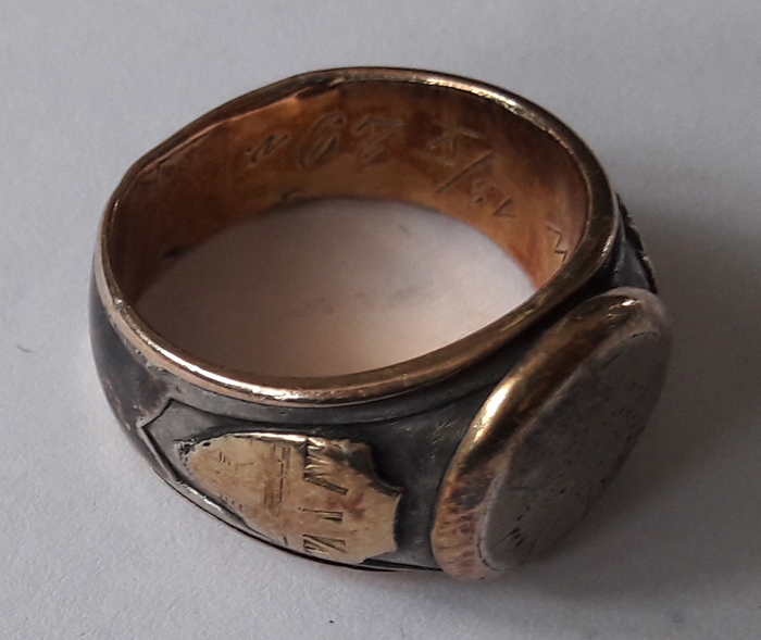 Pierścień 1